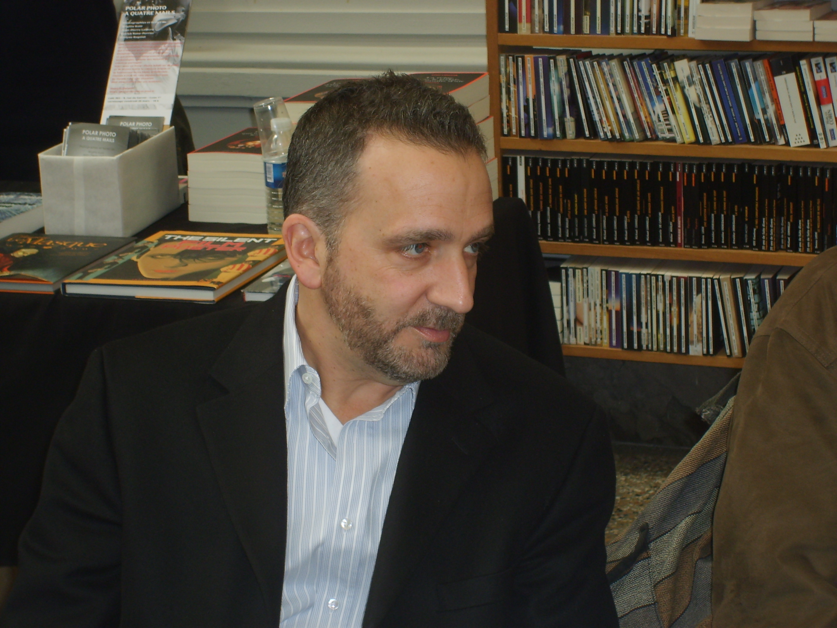 George Pelecanos aux Quais du Polar, Lyon, mars 2008.